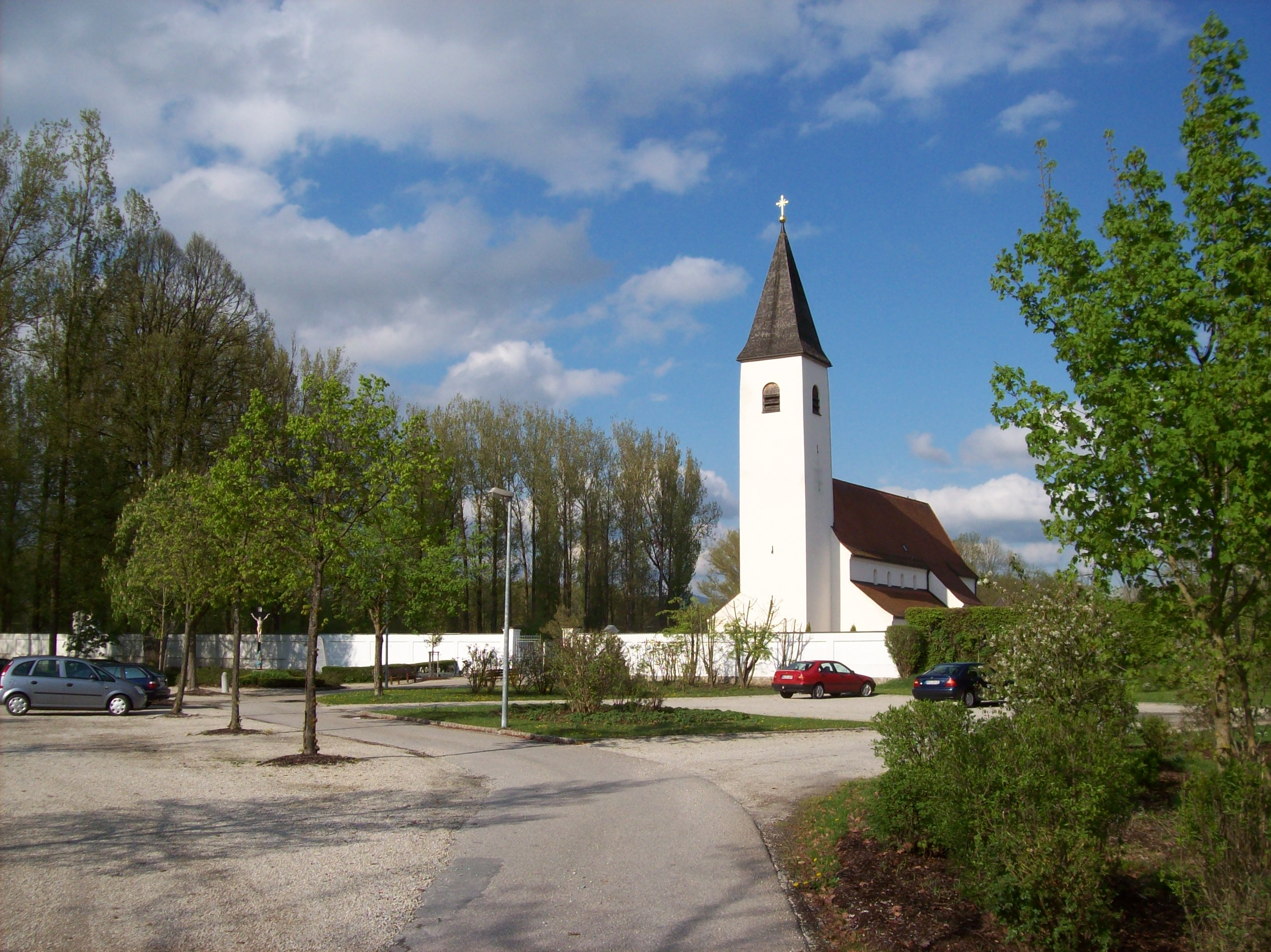 Plattling, Kirche St. Jakob, außen